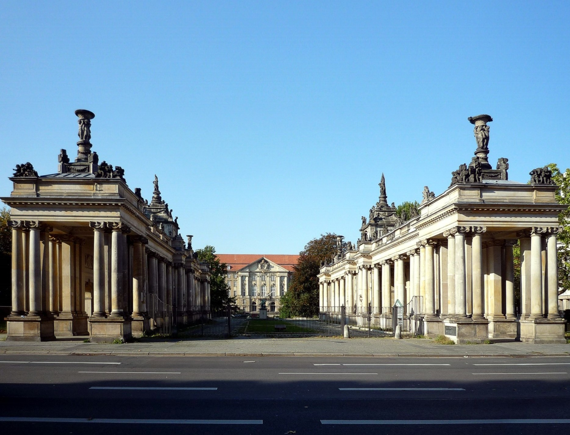 Die Königskolonnaden als Zugang zum Heinrich von Kleist-Park in Berlin-Schöneberg. Im Hintergrund das Gebäude des Kammergerichts.